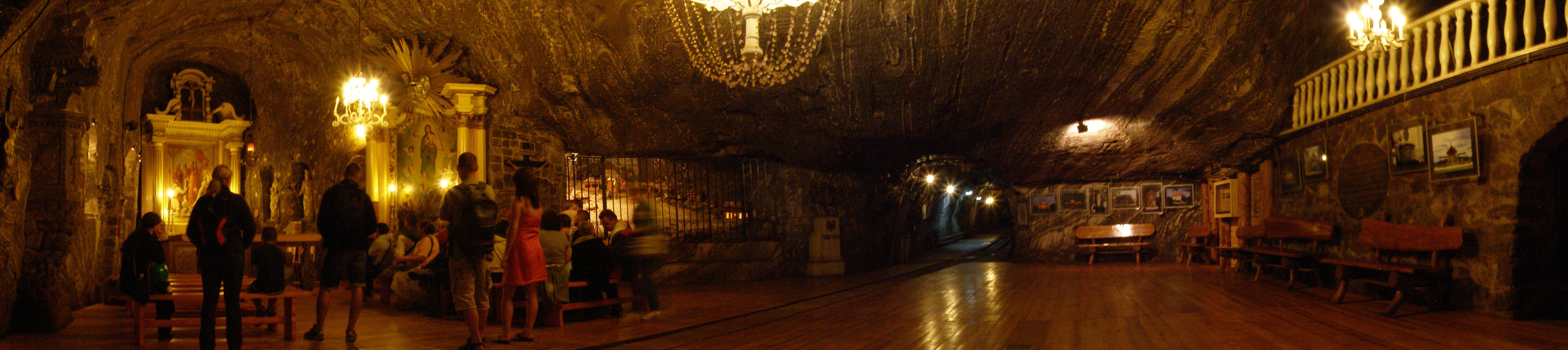 Bochnia - Kopalnia Soli, kaplica św. Kingi